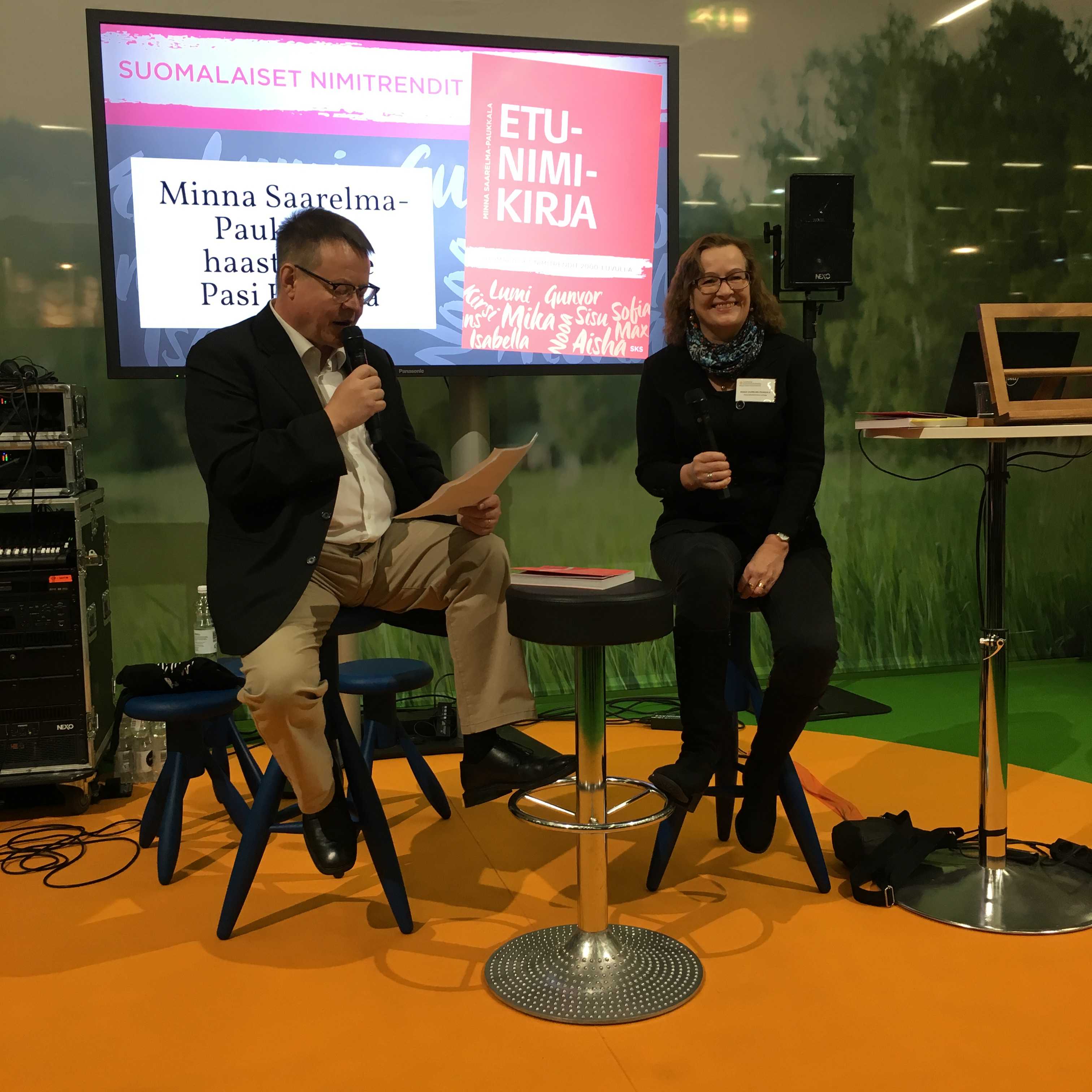 Pasi Heikura haastattelee nimistöntutkija Minna Saarelma-Paukkalaa Helsingin kirjamessuilla syksyllä 2017.